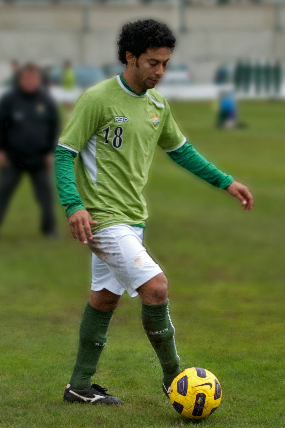 Iriney Santos da Silva